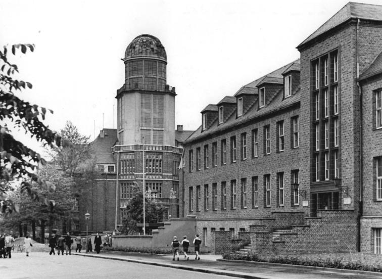 Dresden, Technische Hochschule, Observatorium, Beier-Bau Zentralbild Höhne-Pohl 2.6.1953 125 Jahre Technische Hochschule Dresden Vom 4. bis 7.6.1953 werden die Jubiläumsfeierlichkeiten zur 125. Wiederkehr des Gründungstages der Technischen Hochschule Dresden stattfinden. U.Bz.: Blick auf das Observatorium - das Wahrzeichen der Hochschule - und das wiedererichtete Gebäude für Bauingenieure mit dem Beier-Bau.